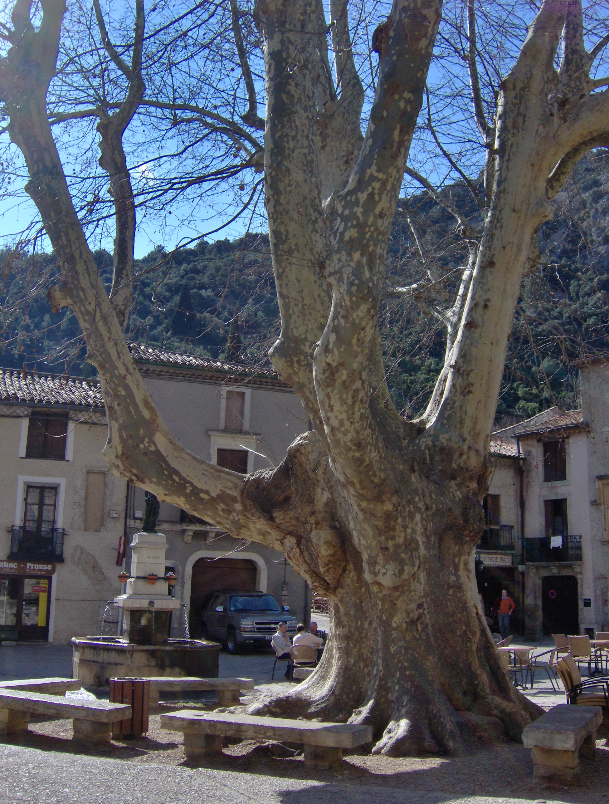 Vieux platane sur la place à Saint-Guilhem-le-Désert (Hérault, France).